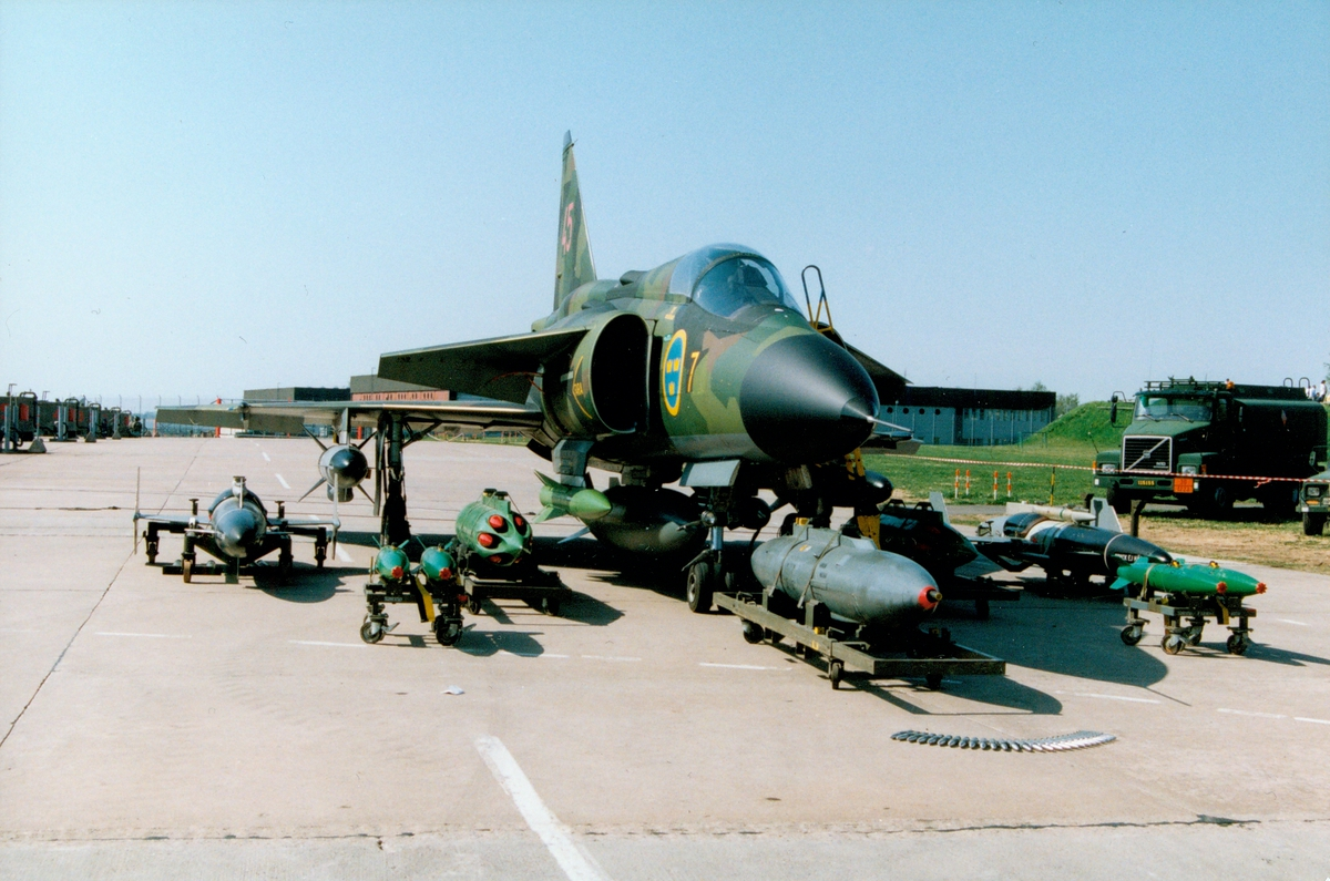 Flygplan AJ 37 märkt nummer 45 från F 7, uppställt med beväpningsalternativen synliga. Planet levererades till Flygvapnet 18/1 1974.